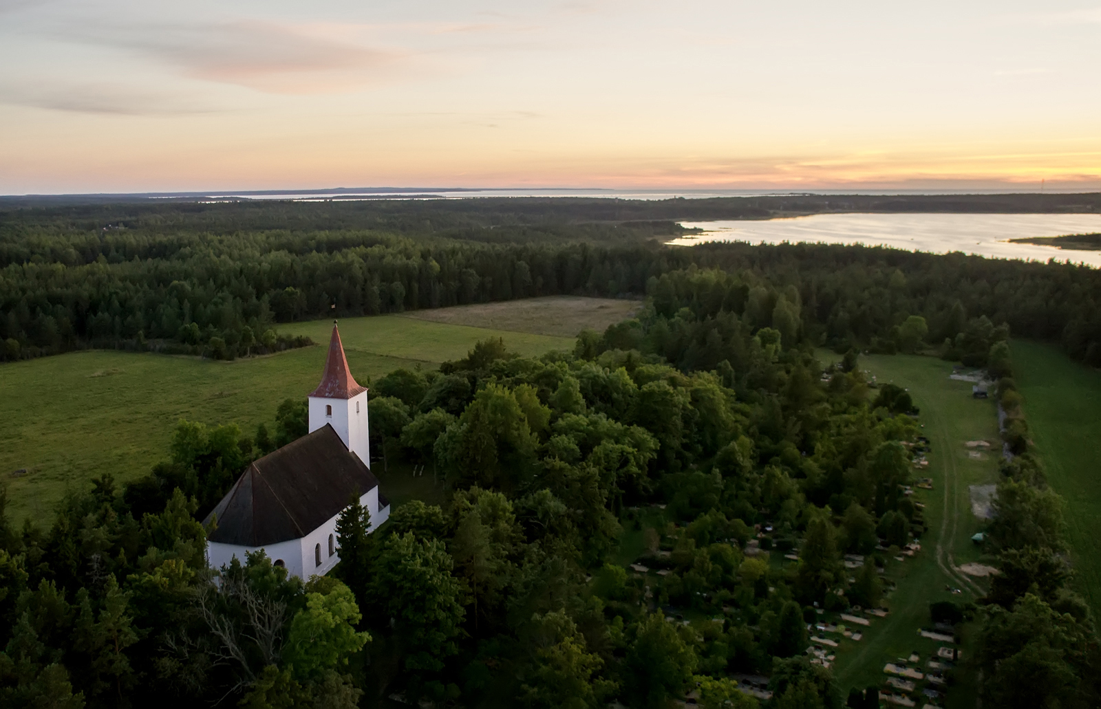 Reigi kirik. Vaade ülevalt. 2013